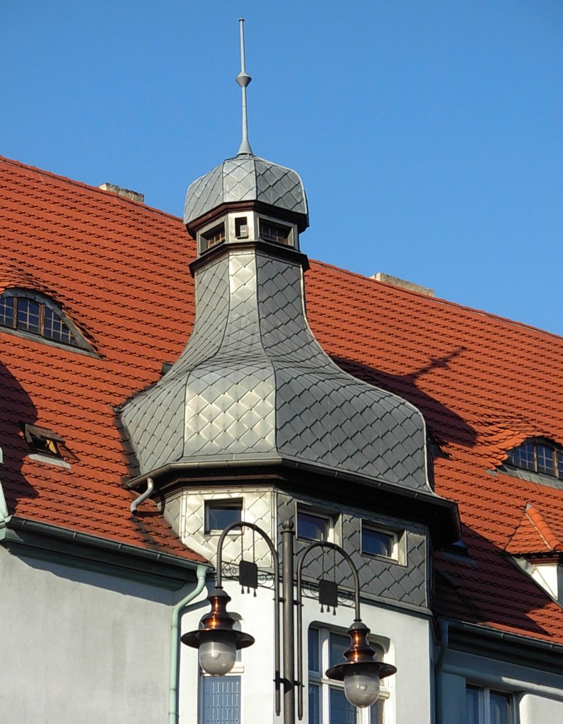 Kamienica ul. Mickiewicza 1 róg Gdańskiej w Bydgoszczy